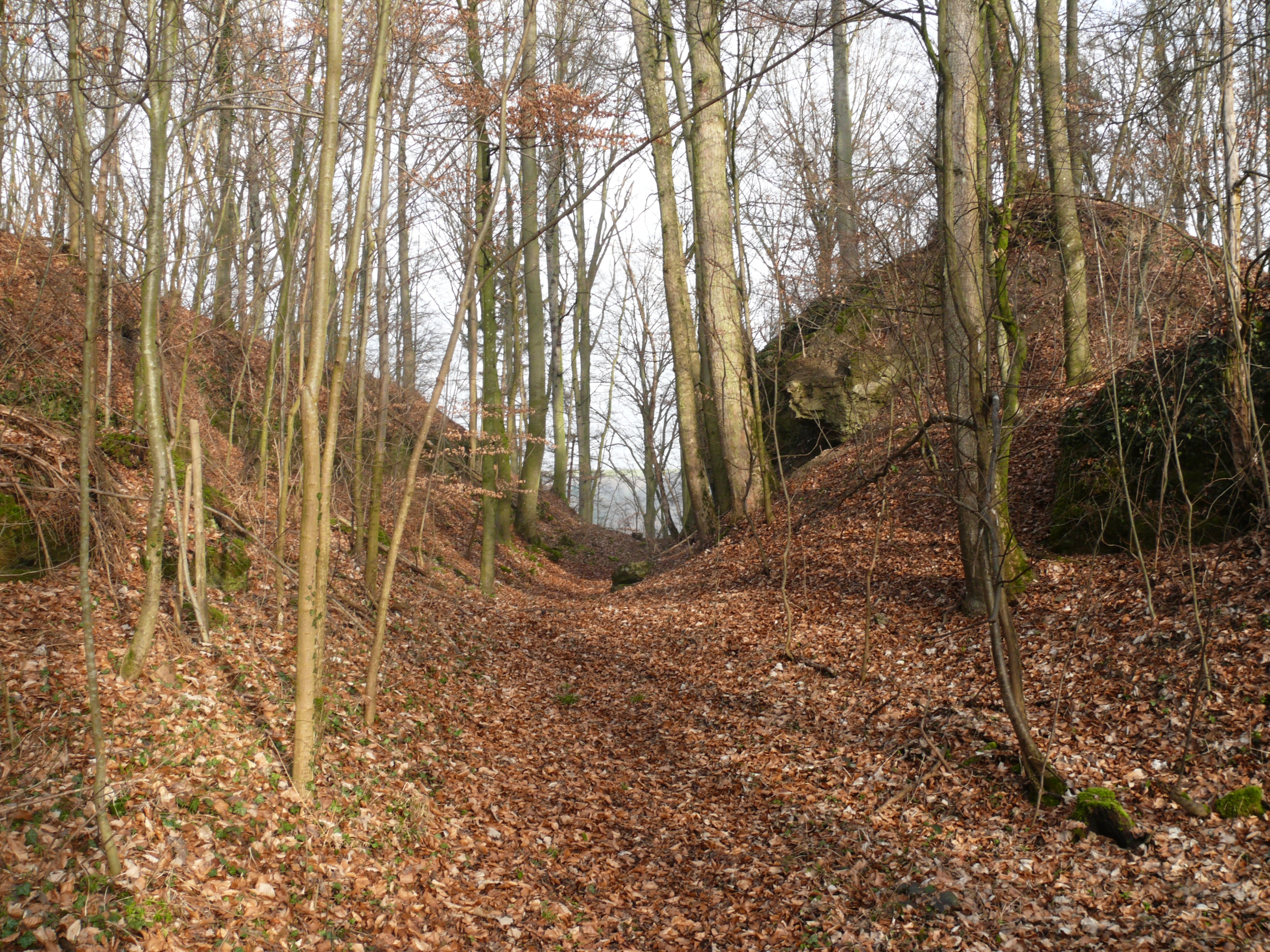 abgegangene Burg Bielriet, Halsgraben